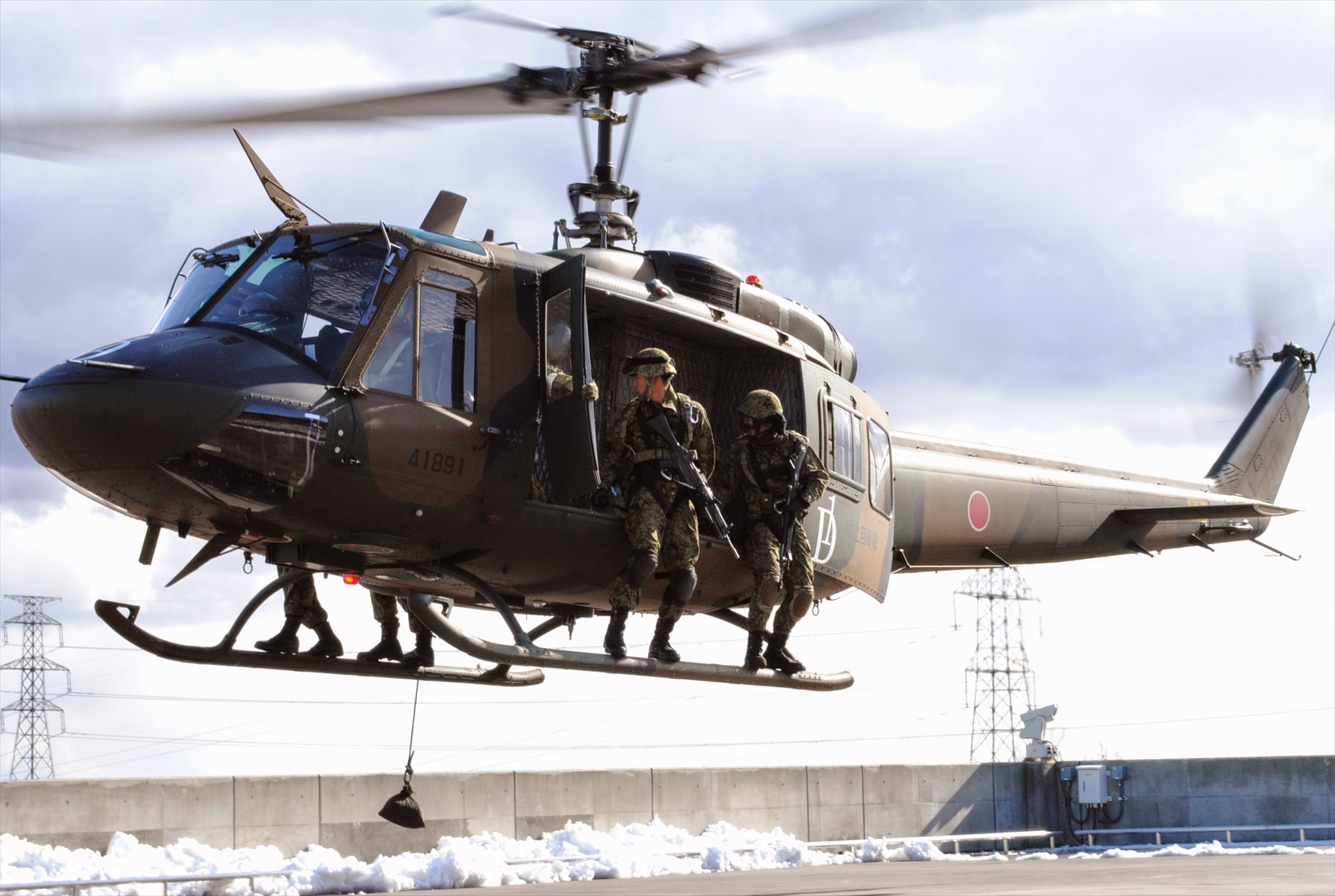 ＵＨ－１Ｊ（空路潜入訓練・第３４普通科連隊）